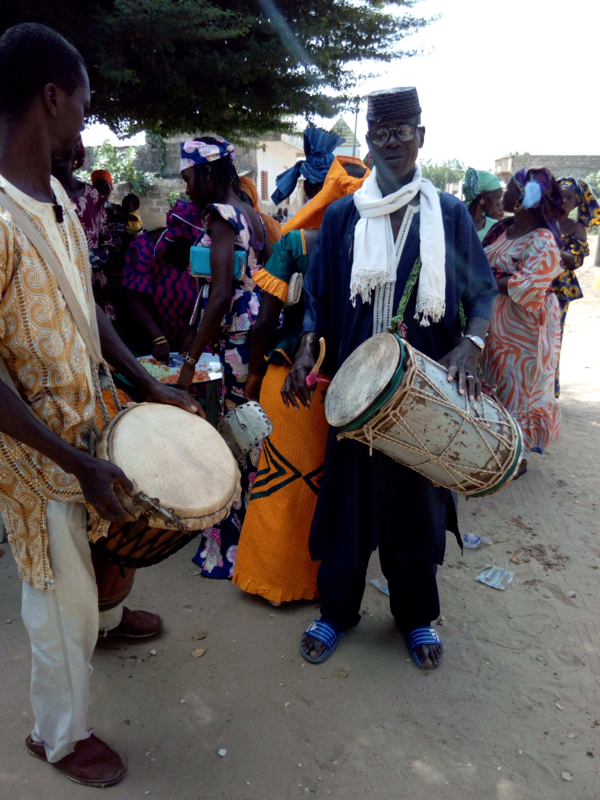 L'image représente des batteurs de djembé bambara durant une cérémonie de baptême de ma soeur. Il célèbre l'arrivée de la mère de l'enfant qui était partie au salon de coiffure du quartier. This is an image of music and dance from Senegal